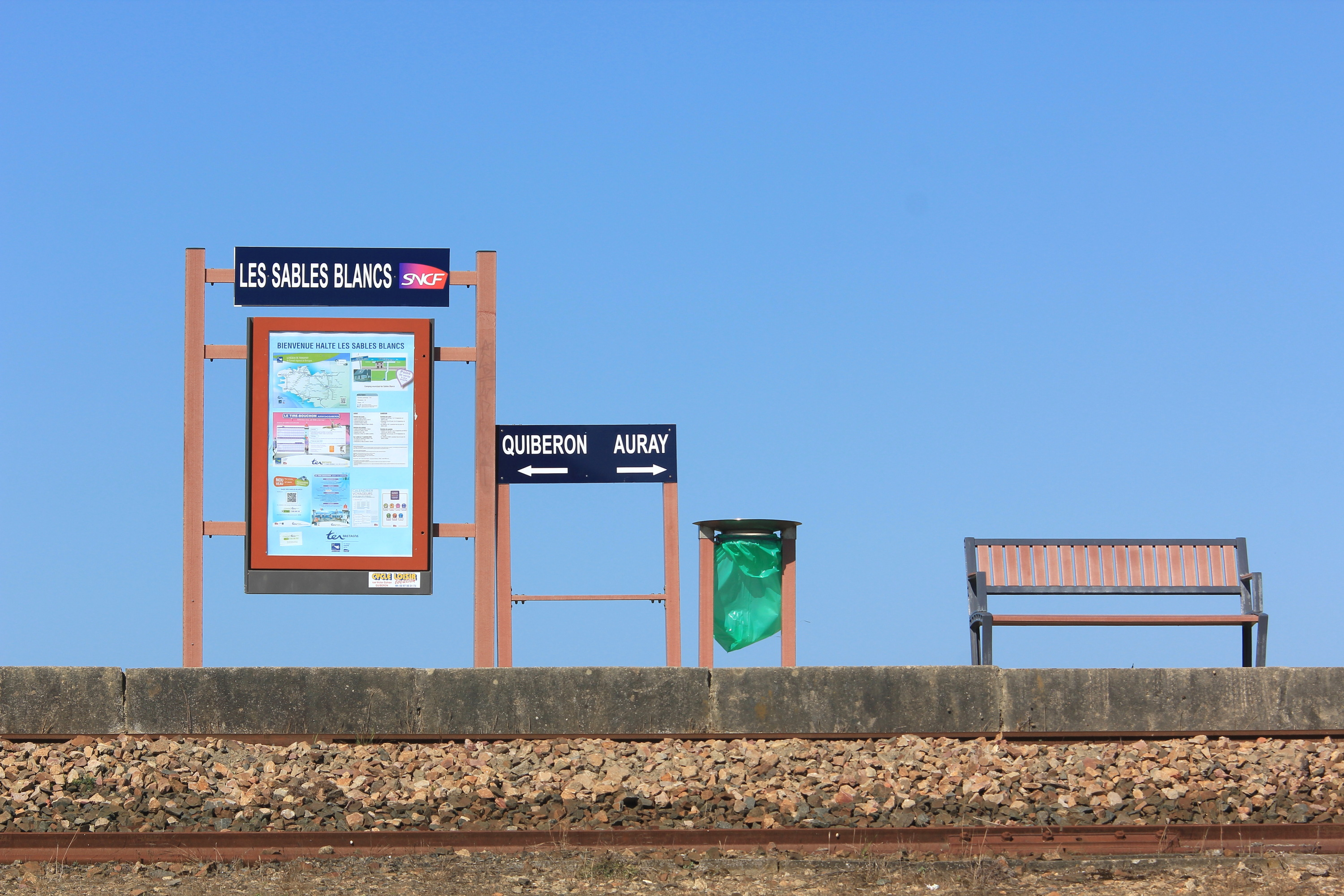 Le mobilier de la halte des Sables Blancs